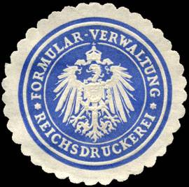 Sealing stamp Title: Reichsdruckerei - Formular - Verwaltung Description: blau, weiß, geprägt Place: size: 4 cm